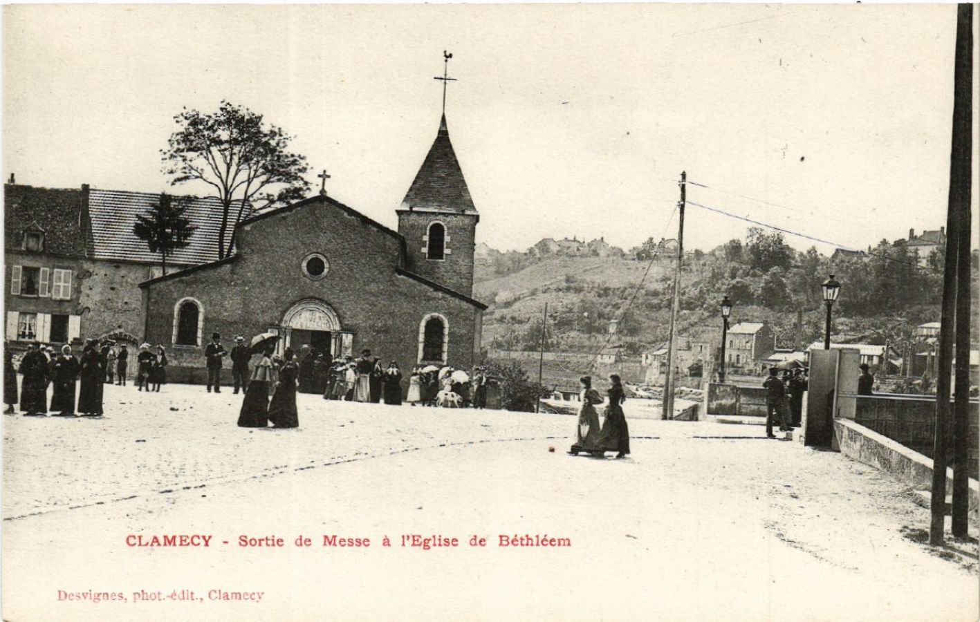 Église Notre-Dame-de-Bethléem de Clamecy en 1905. Cette église a été démolie en 1926 pour bâtir l'église actuelle.